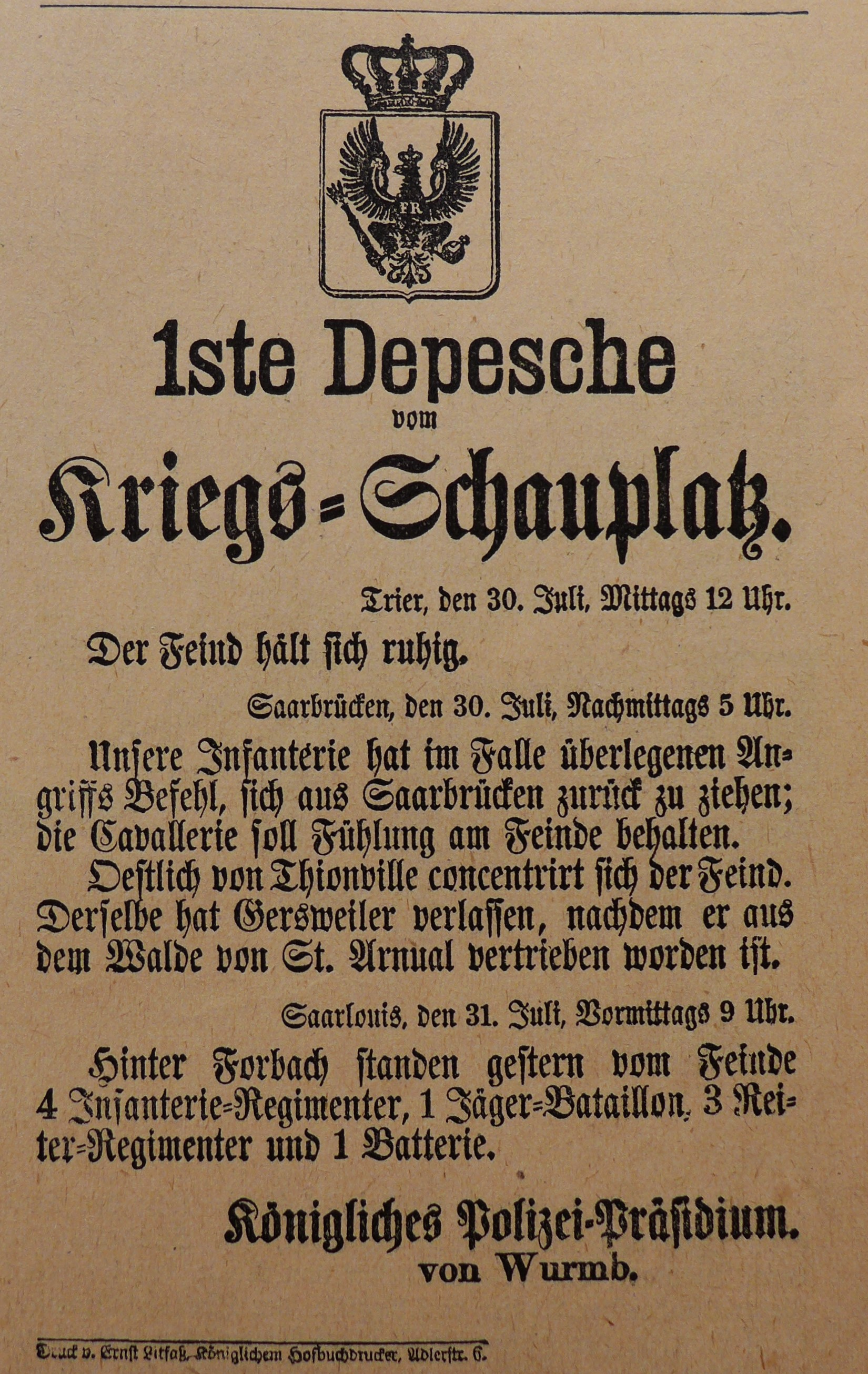 Erste Kriegsdepesche vom Kriegsschauplatz, 30./31. Juli 1870, Druck von Ernst Litfaß (Der große Krieg 1870-71 in Zeitzeugenberichten, nach Paul von Elpons "Tagebuch des deutsch-französischen krieges", hrsg. von Joseph Kürschner, Berlin, Eisenach, Leipzig, Chicago 1895, S. 7.)